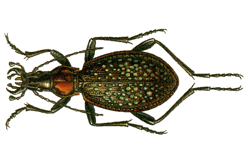 This file has been extracted from another file: Jacobs04.jpg